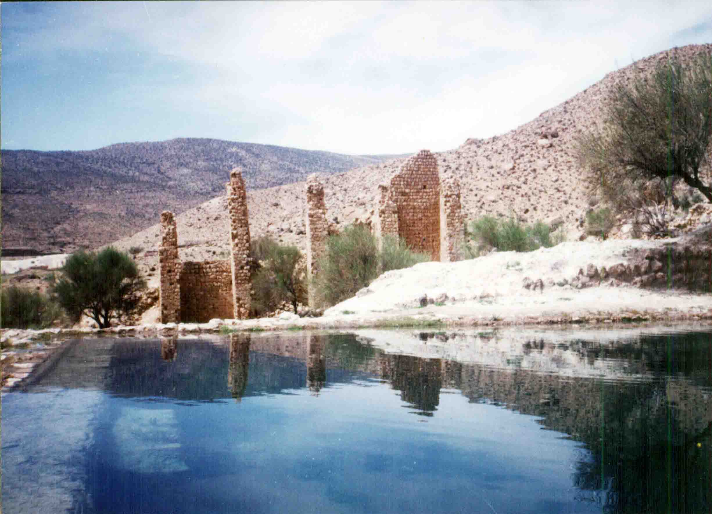 کاخ کيقباد رحمت آباد جویم